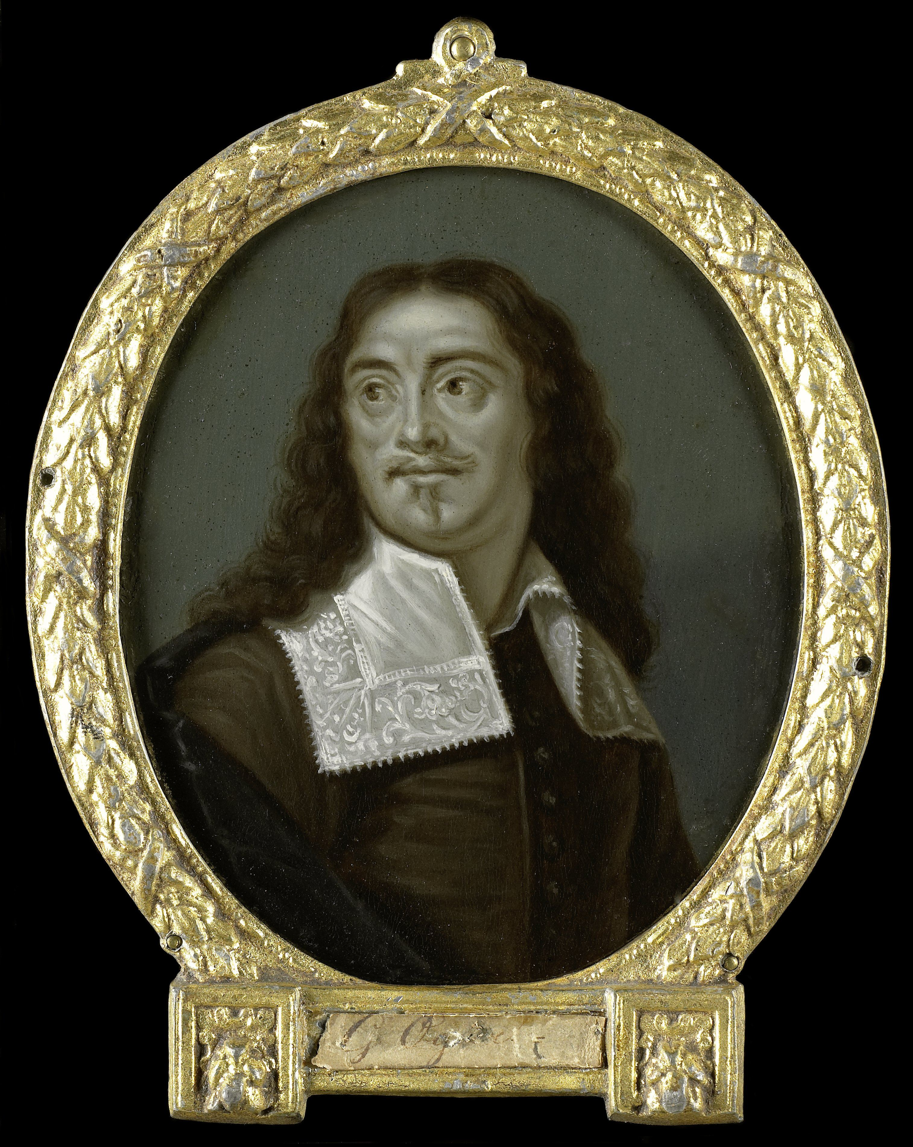 Portret van Willem Ogier (1618-89). Toneeldichter te Antwerpen. Buste in ovaal, het hoofd naar links gekeerd. Onderdeel van een verzameling portretten van Nederlandse dichters. Collection: schilderijen; Panpoeticon Batavum